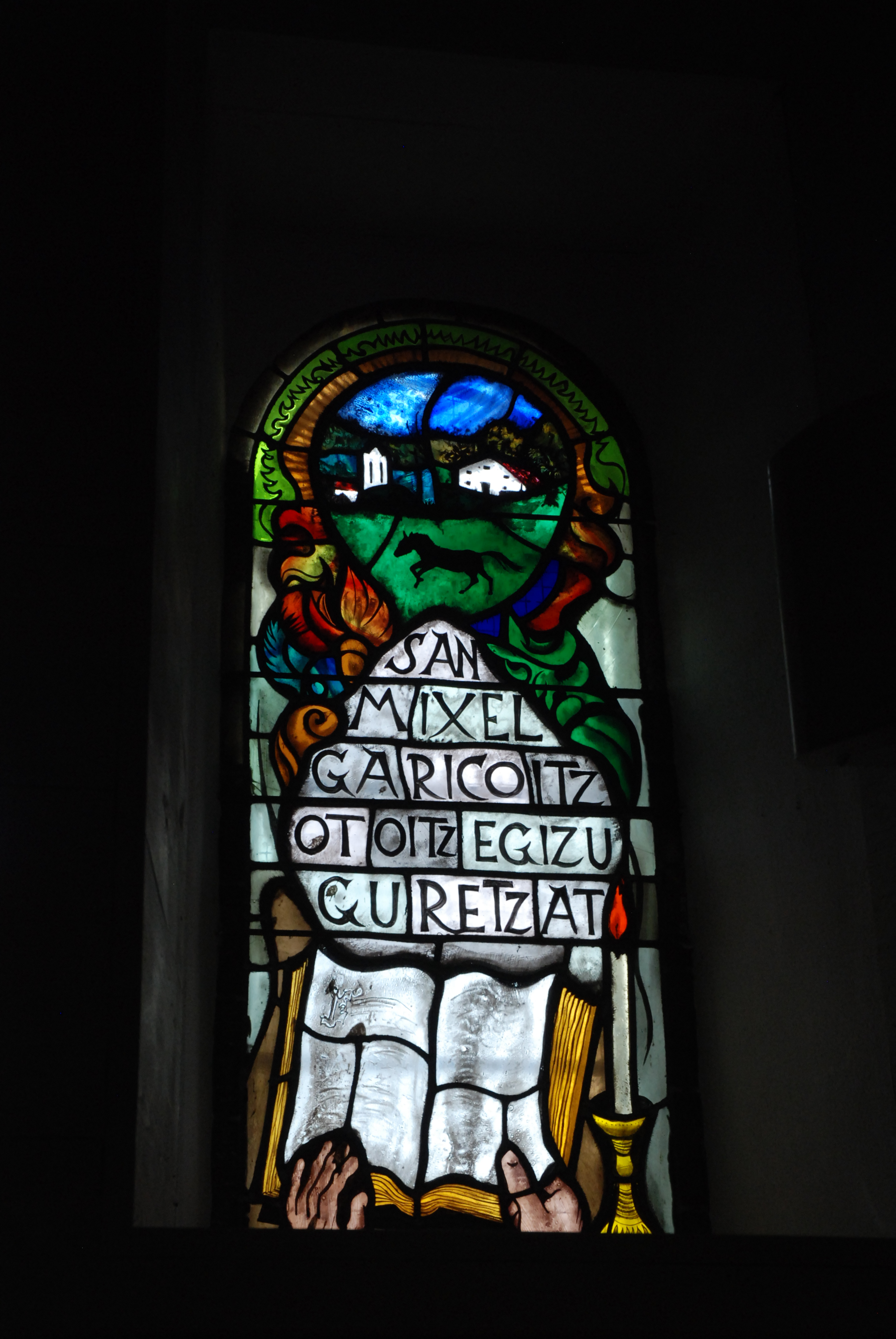 Vitrail dans l'église Saint-Pierre à Juxue